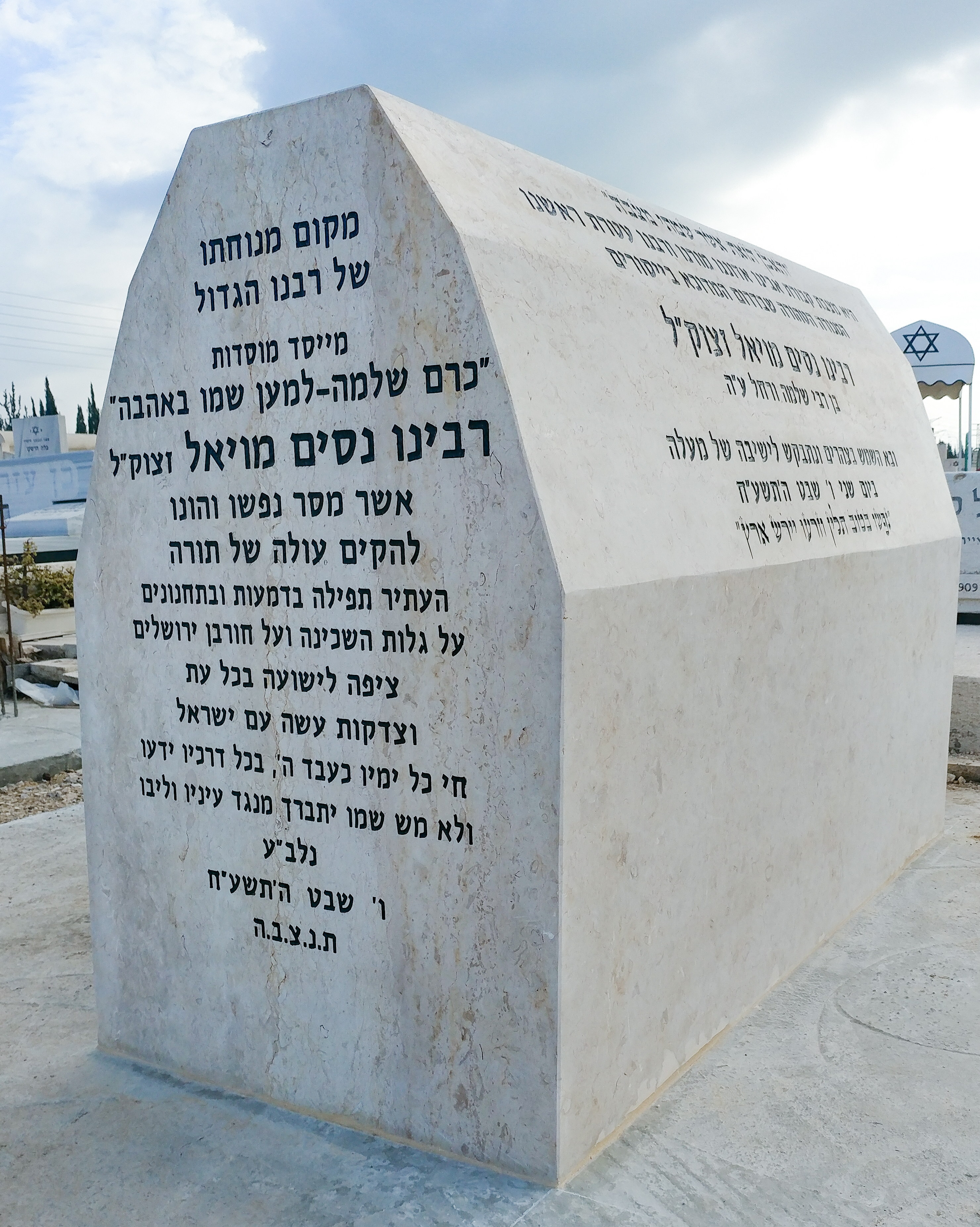 המצבה על קברו של הרב ניסים מויאל זצ"ל בבית העלמין קרית-גת